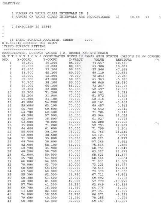 פלט אלפא-נומרי של האנליזה